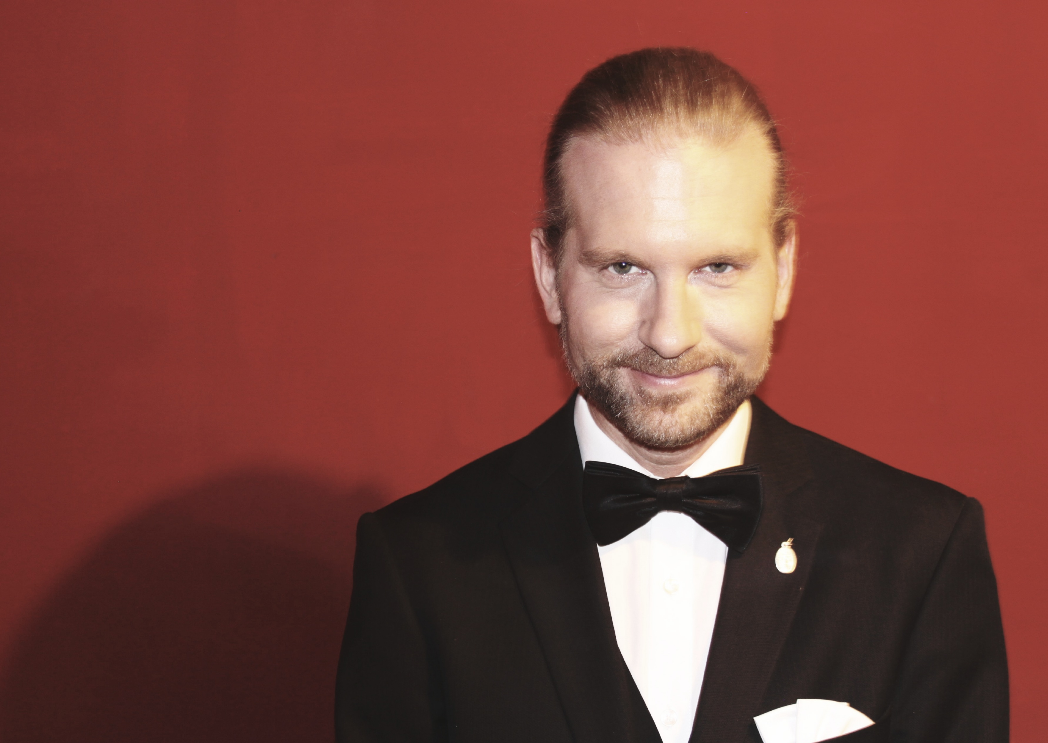 Porträt des Komponisten und Pianisten Hannes Pohlit